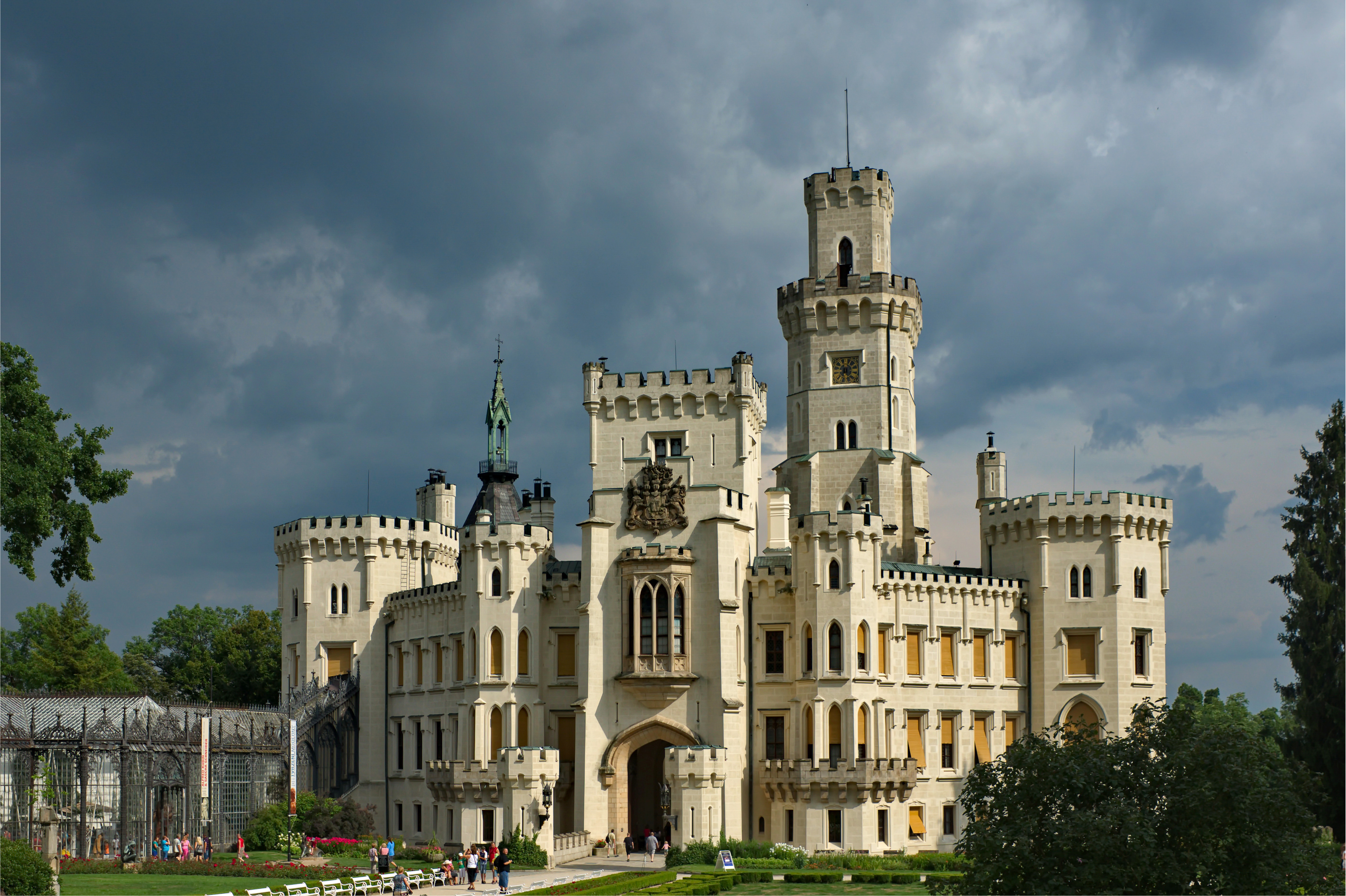 Zámek Hluboka nad Vltavou